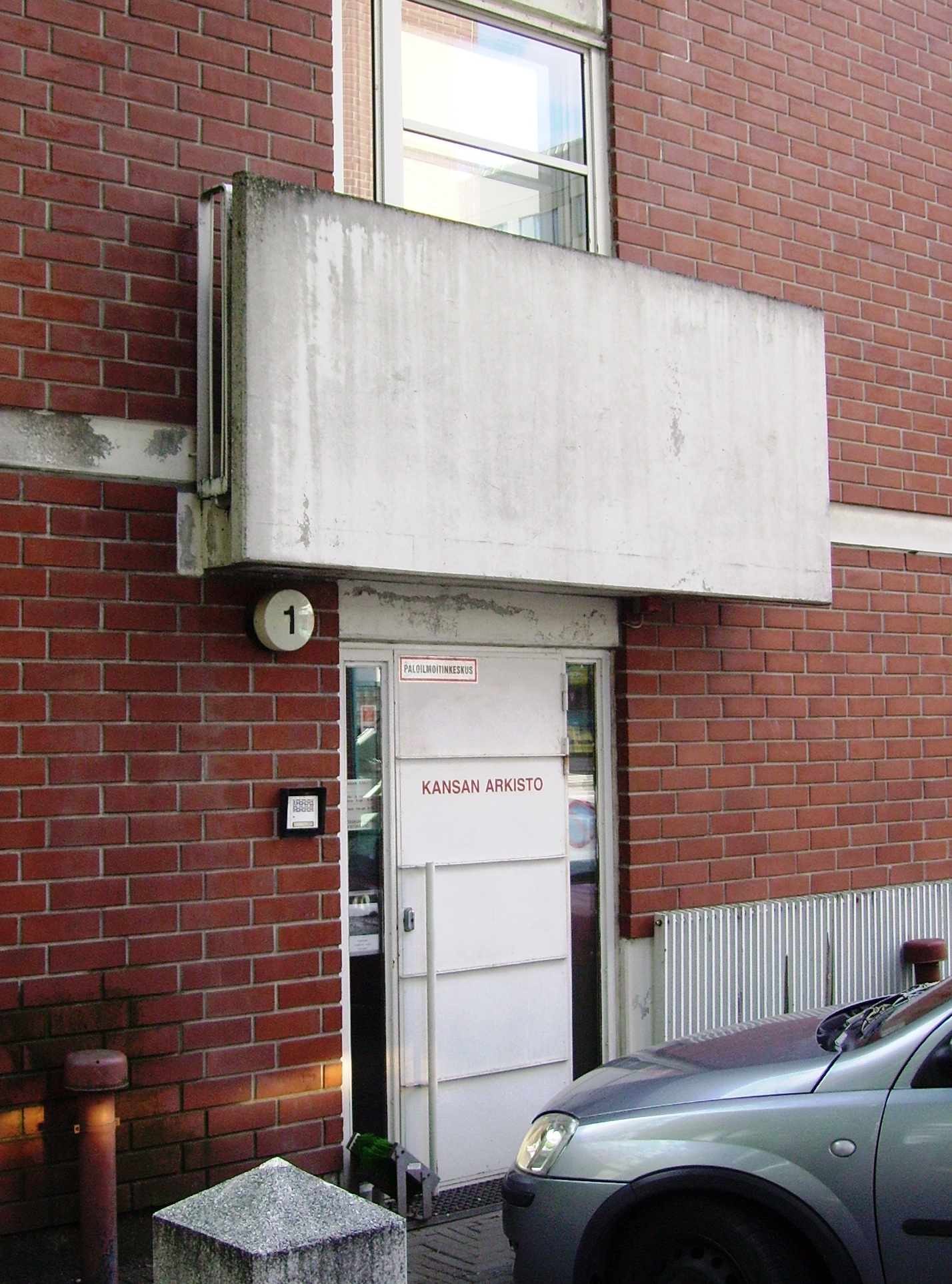 Kansan Arkisto, Helsinki.